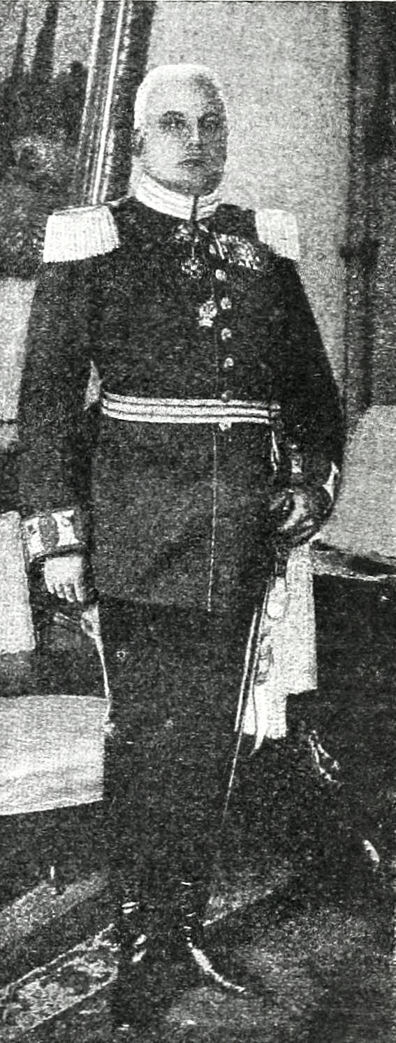 Это изображение было использовано для иллюстрирования статьи «Иорк, фон-Вартенбург, Ганс-Людвиг-Максимилиан, граф» опубликованной в одиннадцатом томе «Военной энциклопедии», который был издан книгоиздательским товариществом И. Д. Сытина в 1913 году в столице Российской империи городе Санкт-Петербурге (Полковник [de: Oberst] граф Максимильян Йорк - внук Иоганна Давида Людвига Йорка фон Вартенбурга).